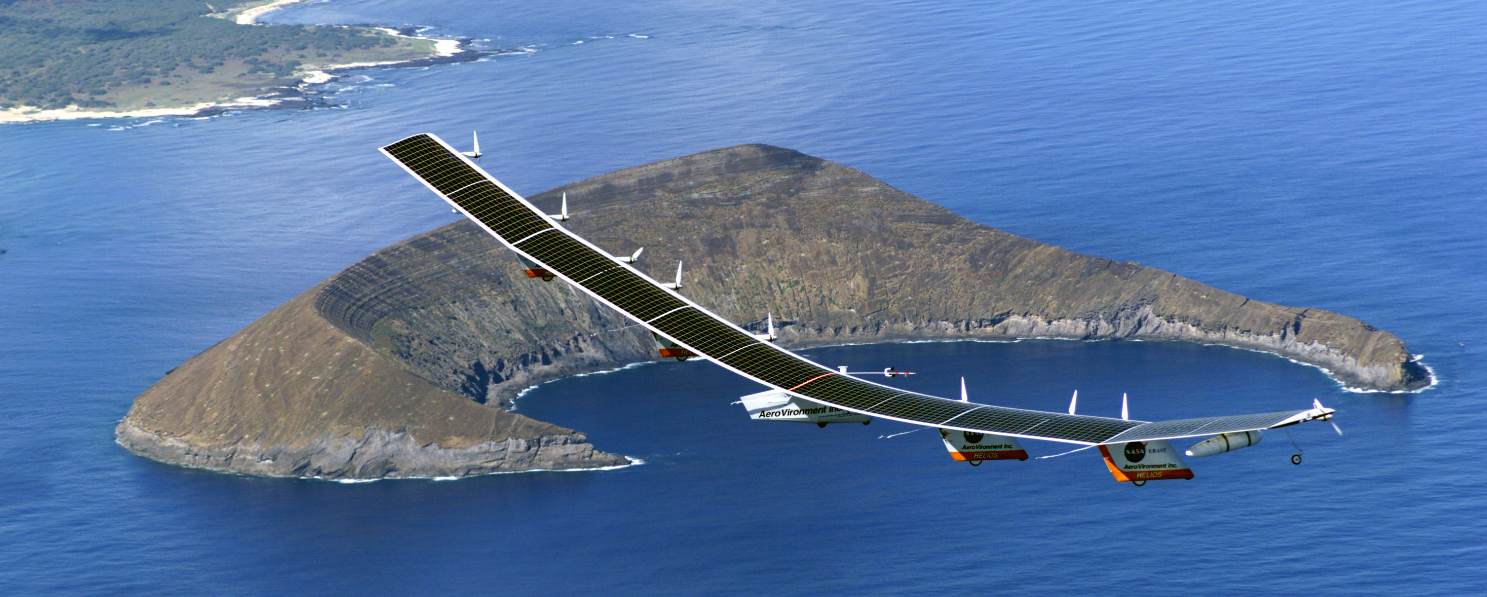 Den Helios an der Luucht.